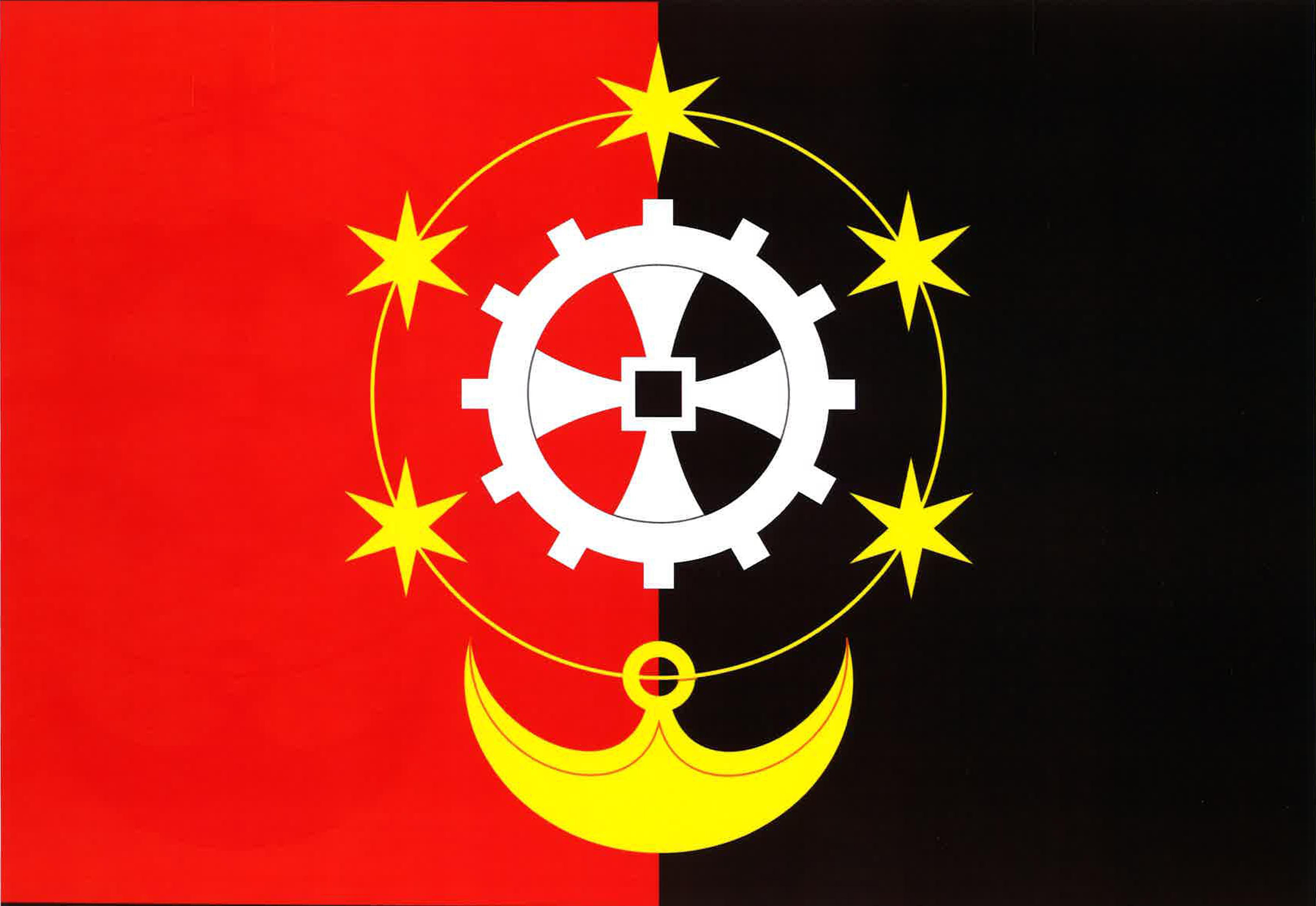 Trhanov vlajka